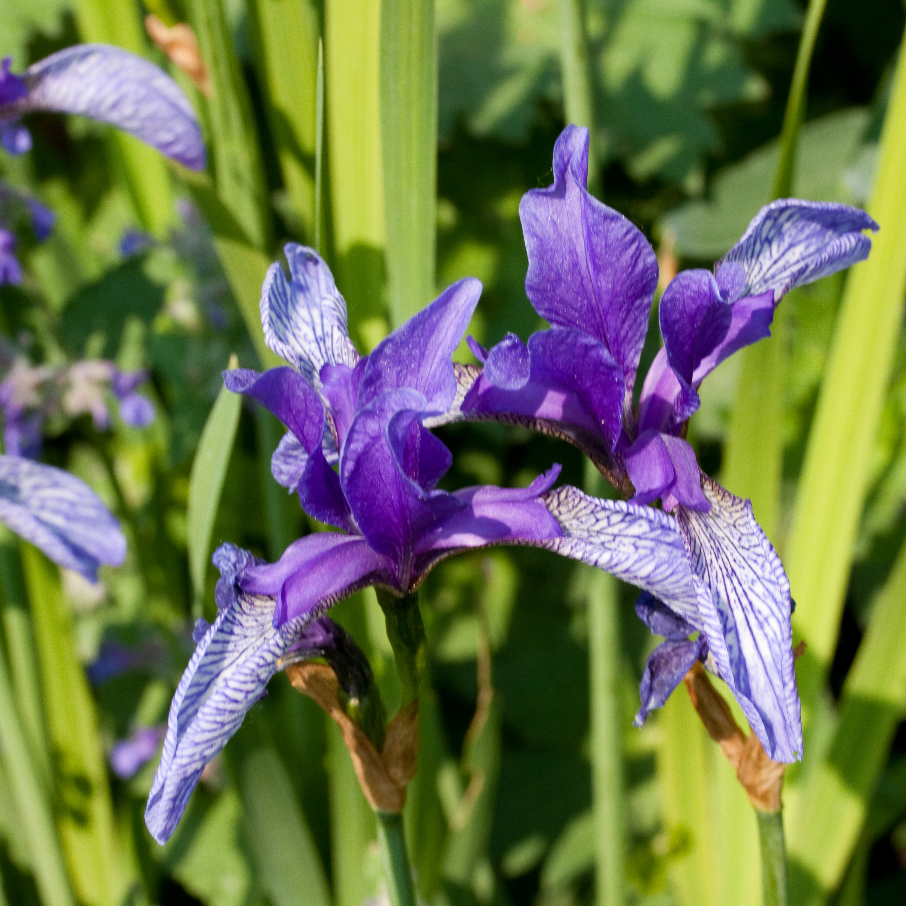 Jardin des Plantes - Paris